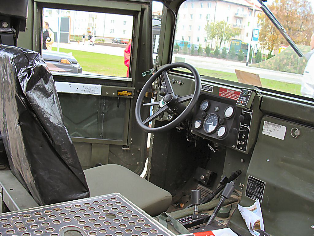 Humvee - wnętrze pojazdu